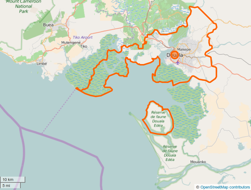 Communauté urbaine de Douala, Cameroun, OSM. This map may be incomplete, and may contain errors. Don't rely solely on it for navigation.